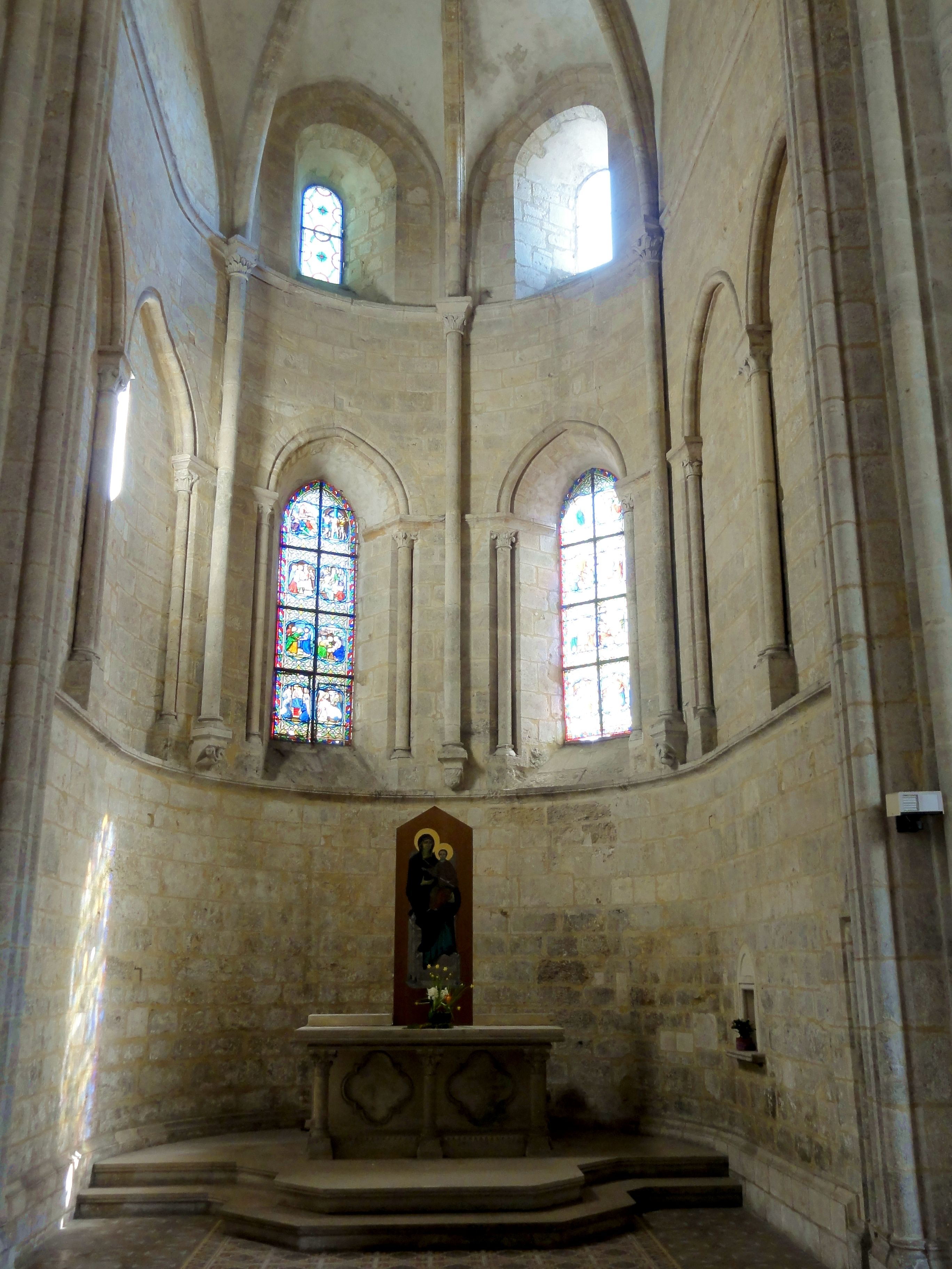 Chapelle du Rosaire.